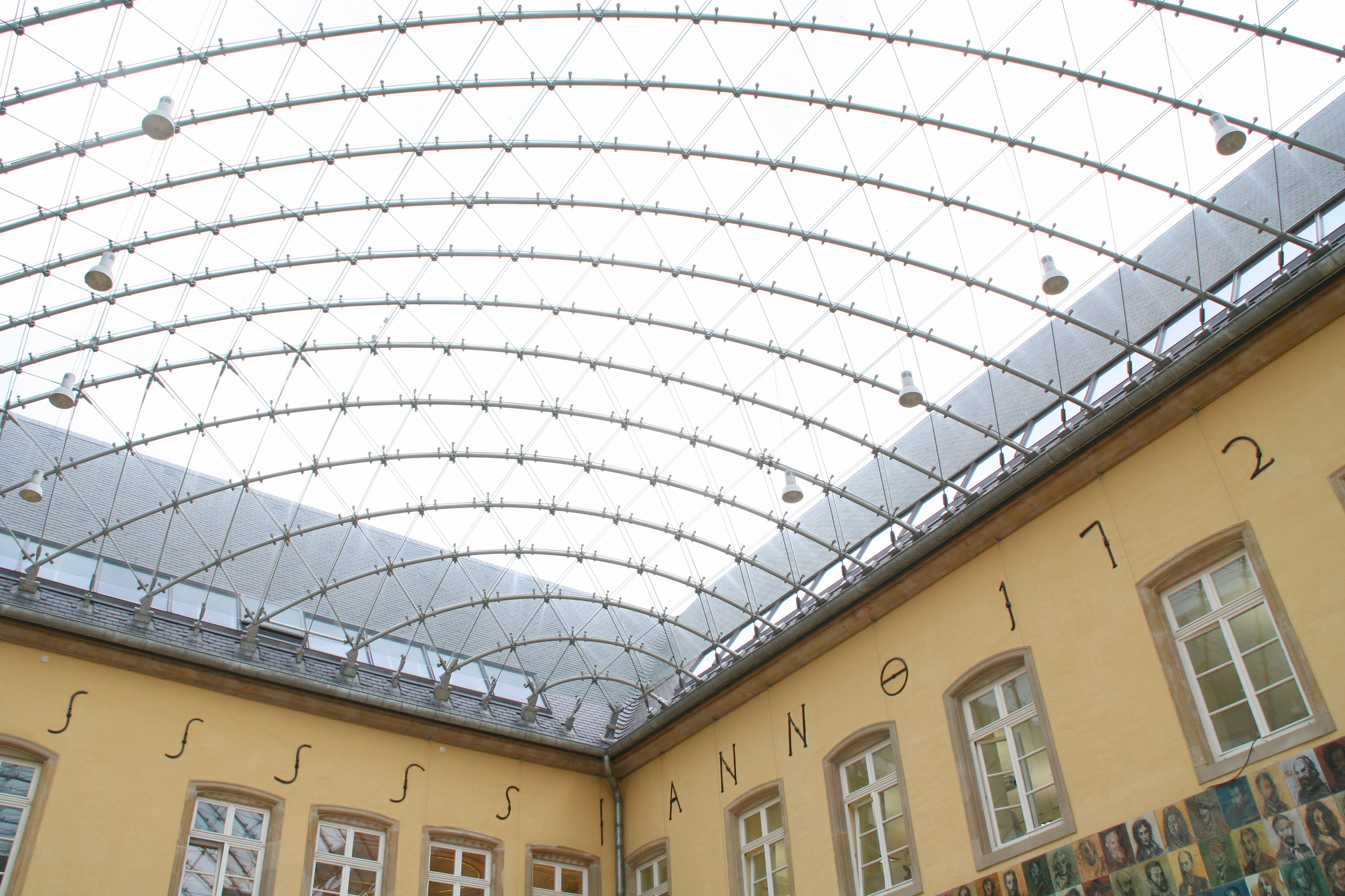 Neimënster, gedeckte Bannenhaff, Daach Eege Foto vum User:Cornischong Lizenz